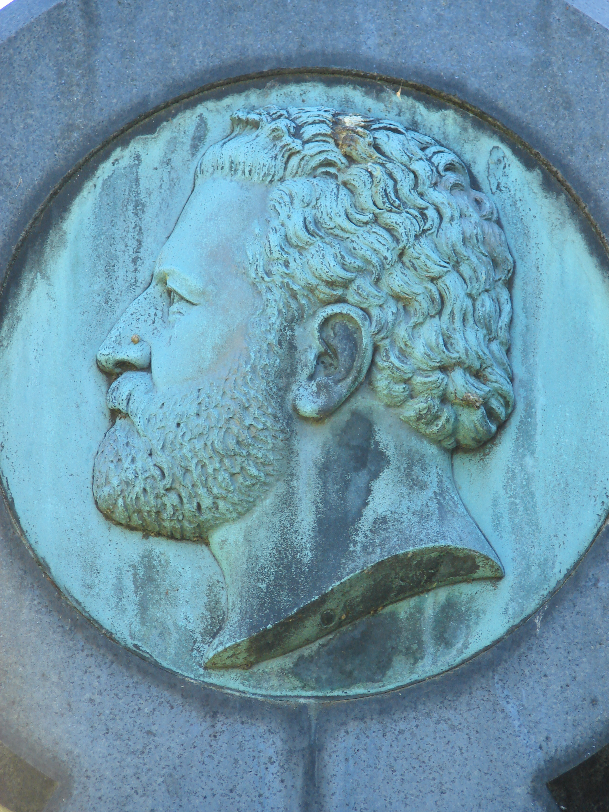 Christoph Cloëtta (1835-1897), chokoladefabrikant og schweizisk konsul, medaljon fra gravsted på Assistens Kirkegård, København